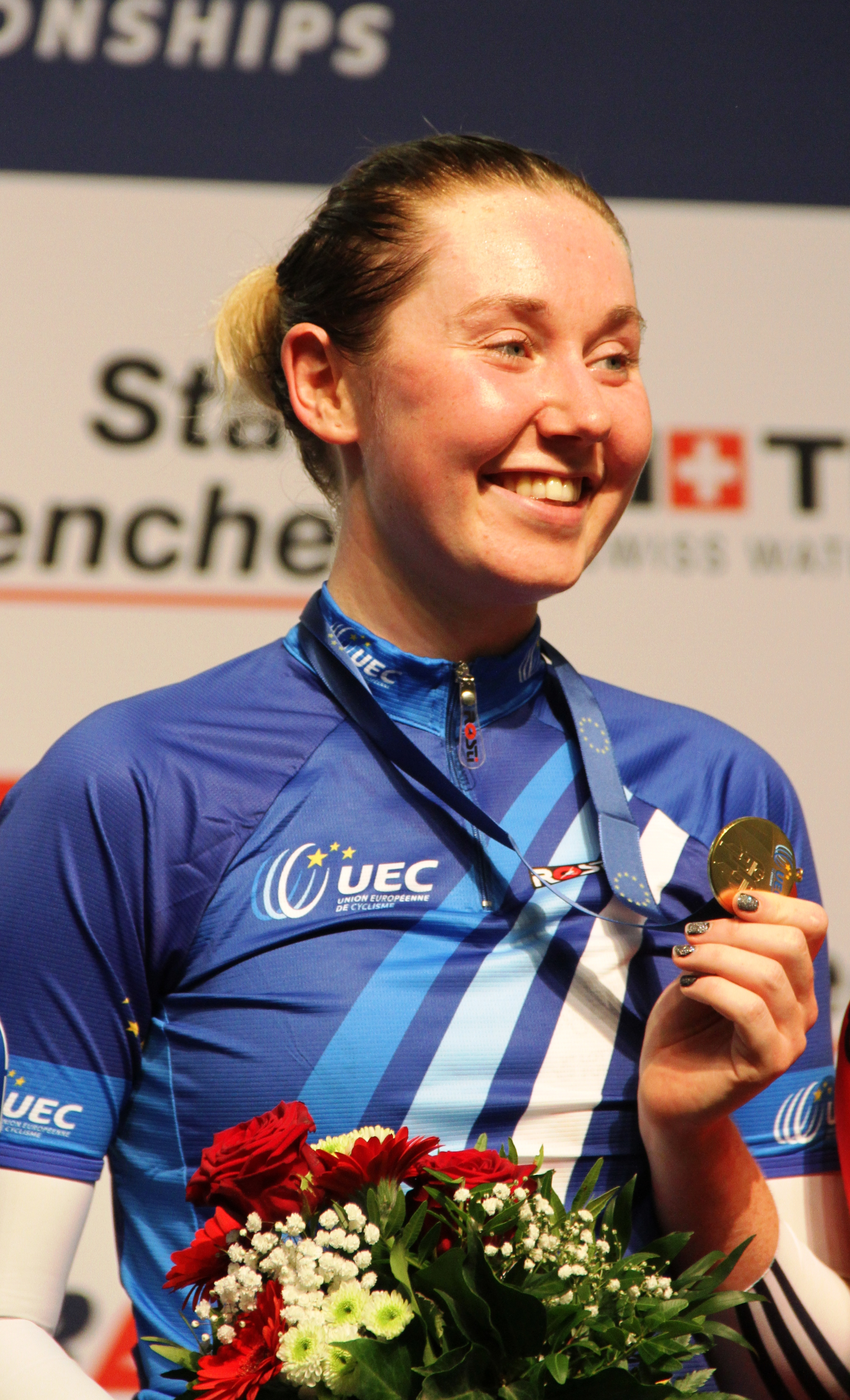 Katie Archibald, brit. Radsportlerin, Europameisterin im Ausscheidungsfahren The making of this document was supported by the Community-Budget of Wikimedia Germany.